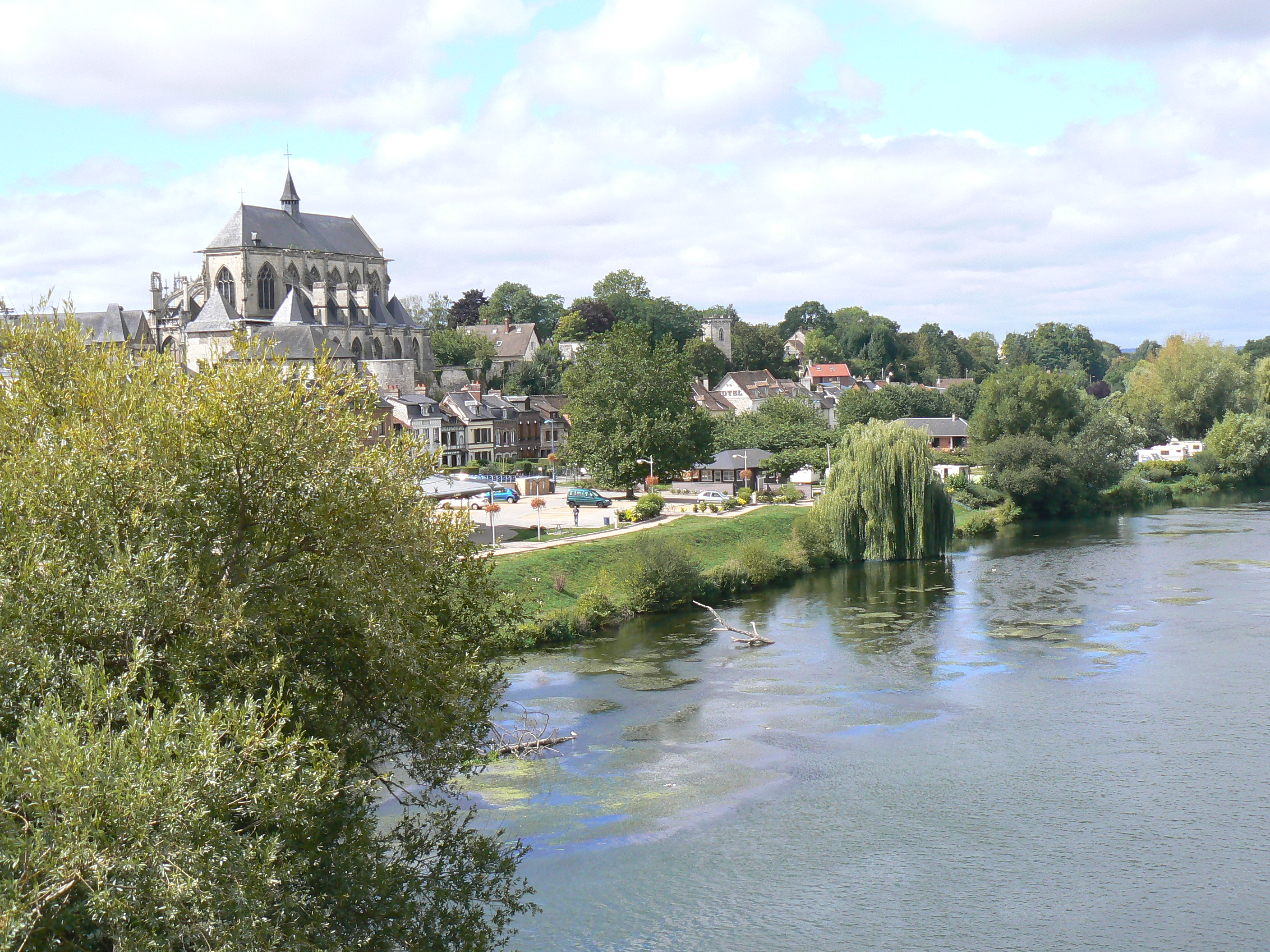 Vue de Pont-de-l'Arche depuis le pont - Au premier plan, l'Eure (2011)